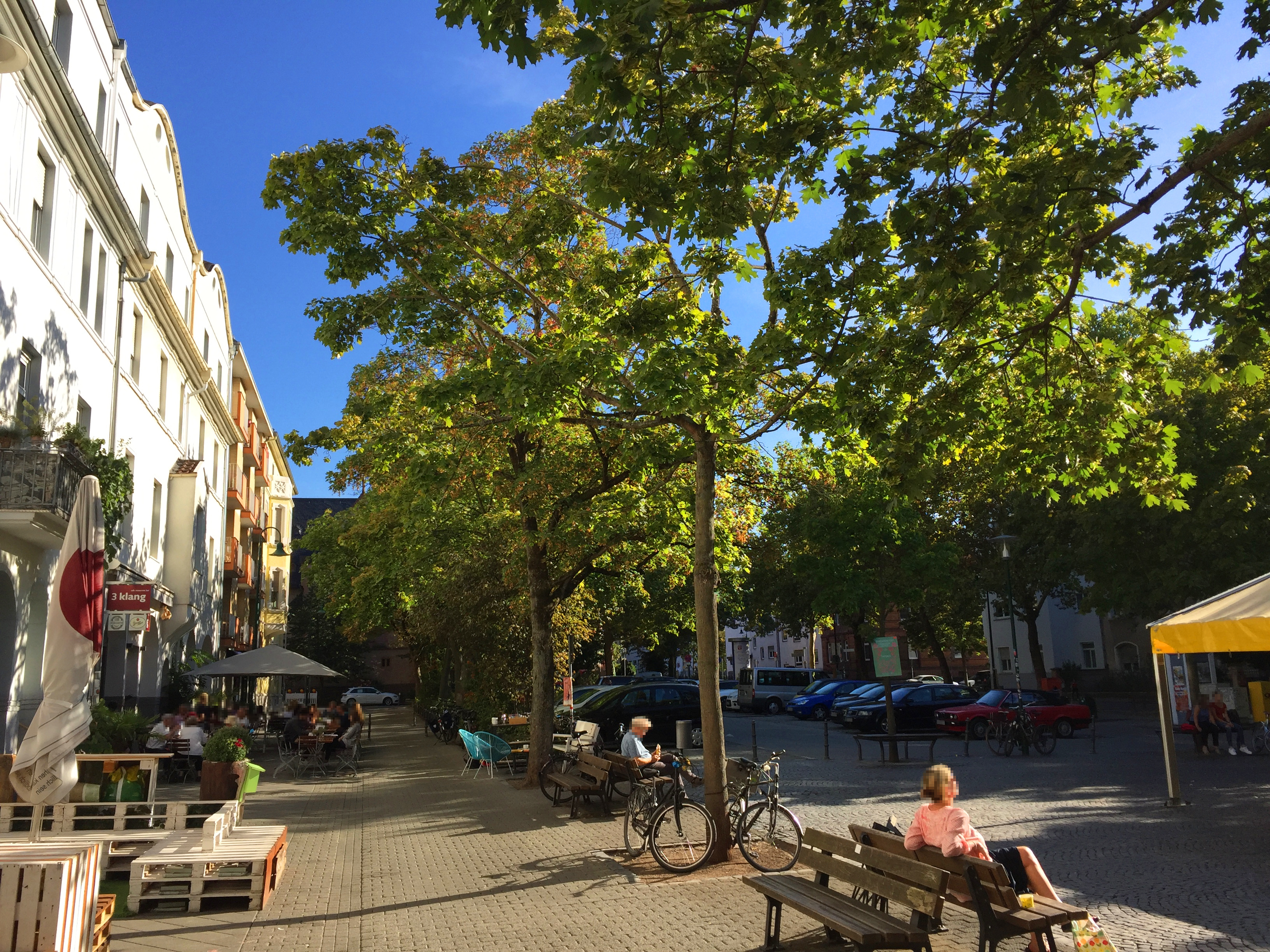 Der Riegerplatz im Darmstädter Martinsviertel am 11. September 2018.